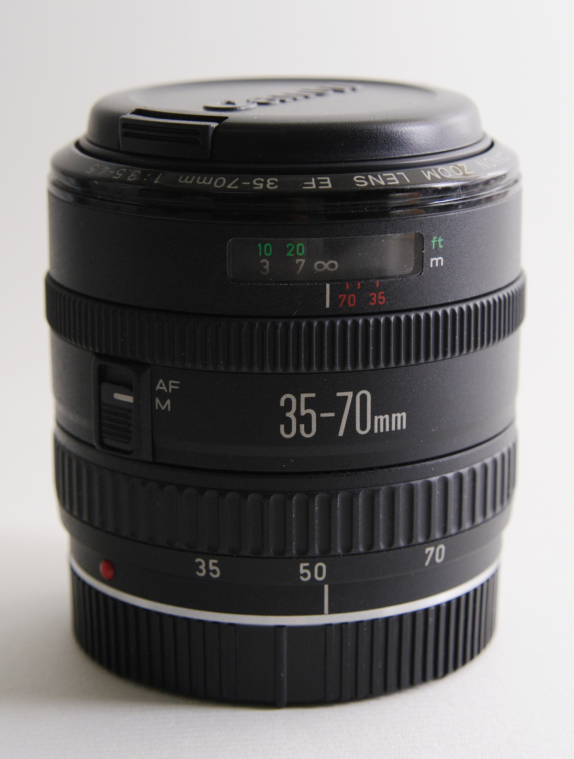 Canon EF 35-70mm F3.5-4.5鏡頭。